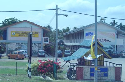 Sekolah Kebangsaan Tanjung Karang, Selangor Darul Ehsan.